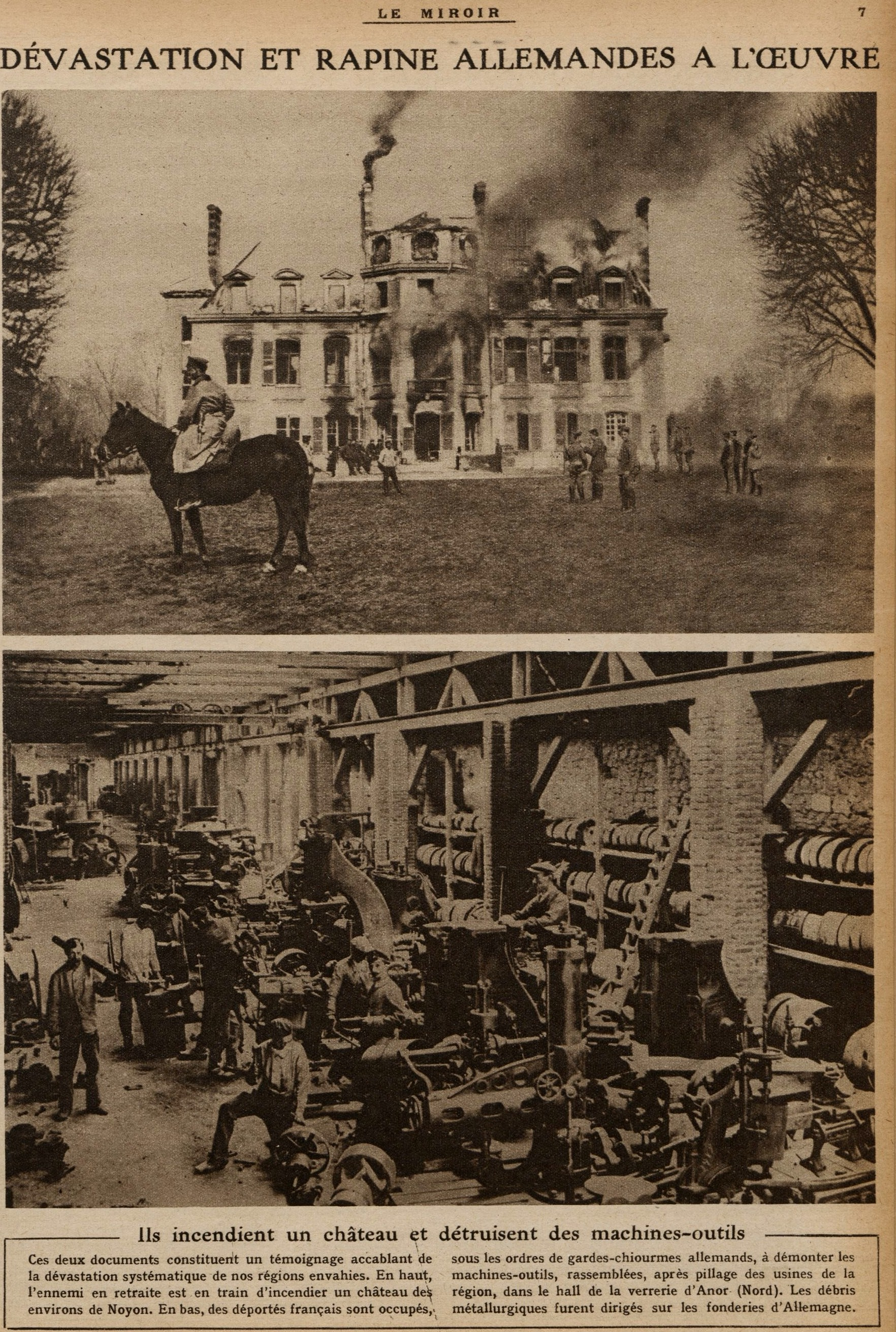 Le miroir 15-12-1918 - enlèvement des machines outils de la verrerie par les allemands